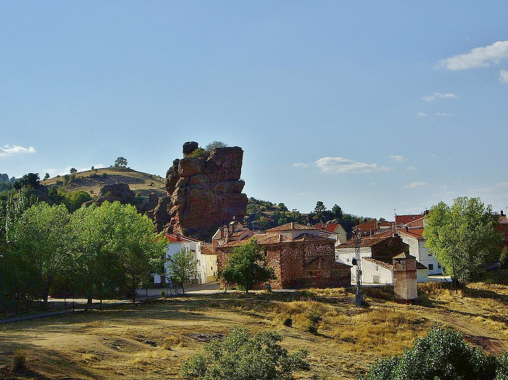 Chequilla (Guadalajara, España).